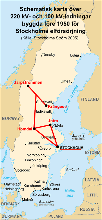 Schematisk karta över 220kV och 100 kV- ledningar byggda före 1950 för Stockholms elförsörjning. Källa: Stockholms Ström